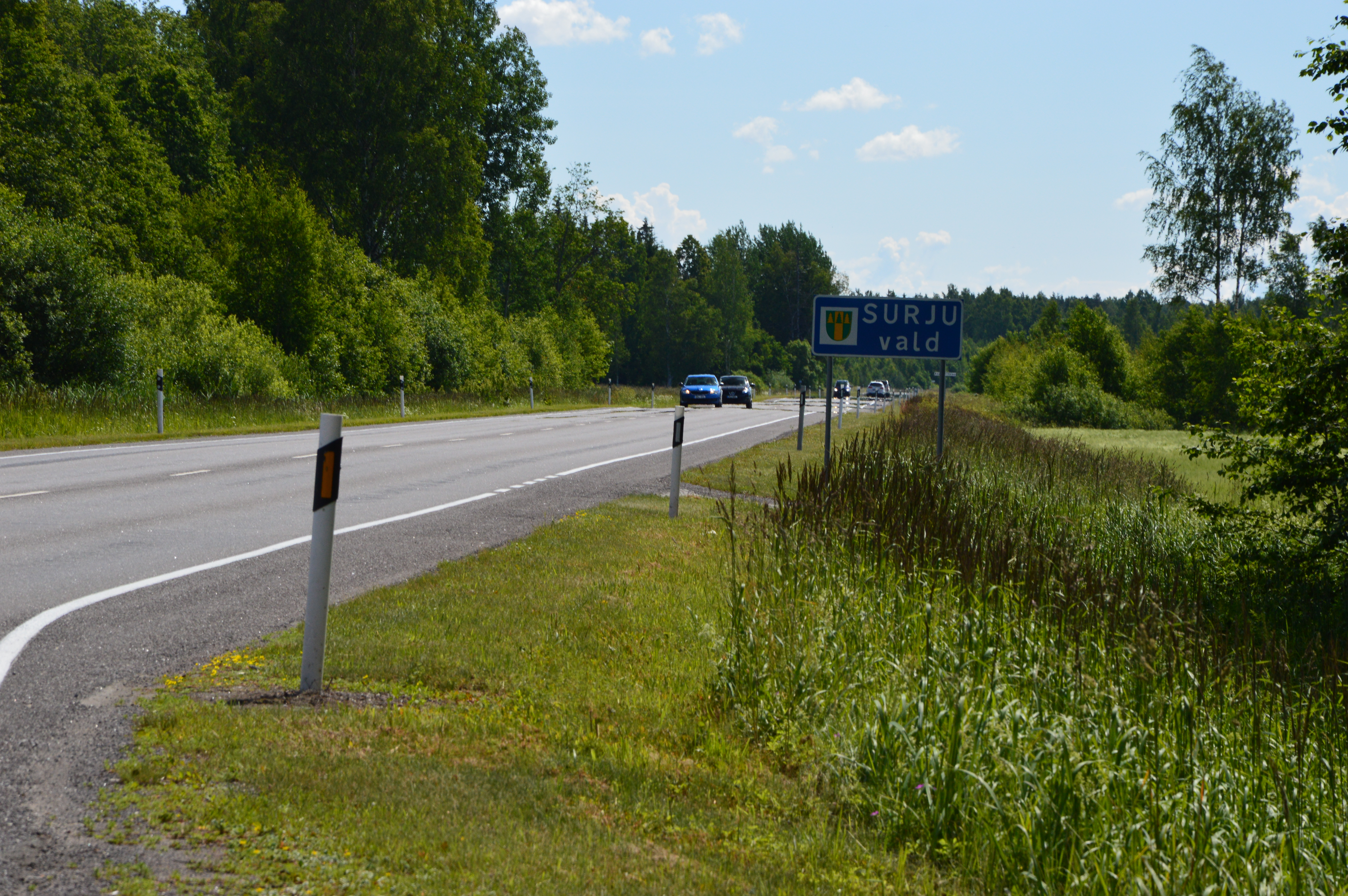 Siia on kavandatud maantee ja Rail Balticu ristumine.